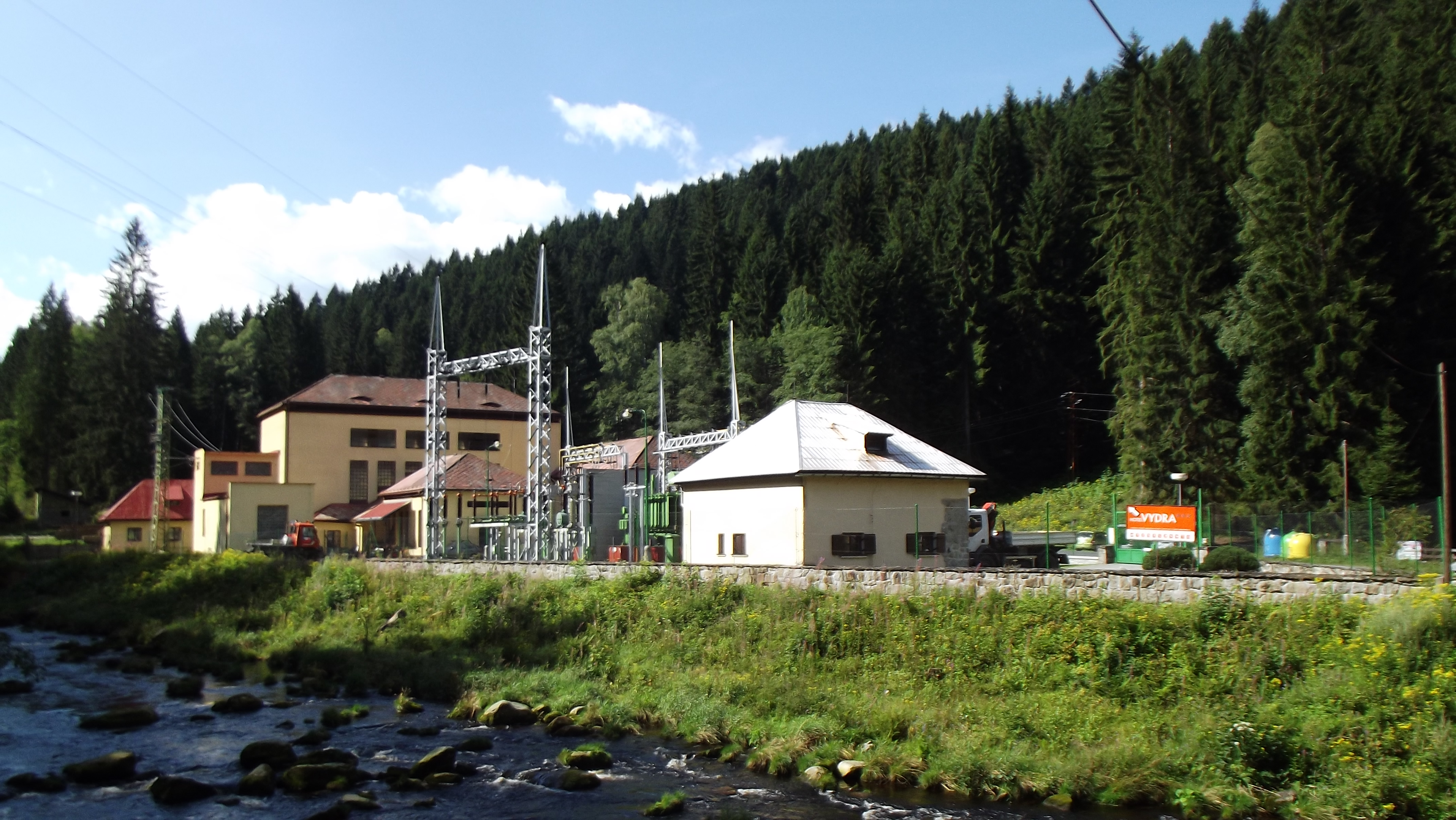 Fotografie pořízena v okolí Čeňkovy pily na Šumavě.